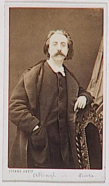 Auguste Allongé (1833—1898) était un dessinateur et artiste-peintre français du XIXe siècle.